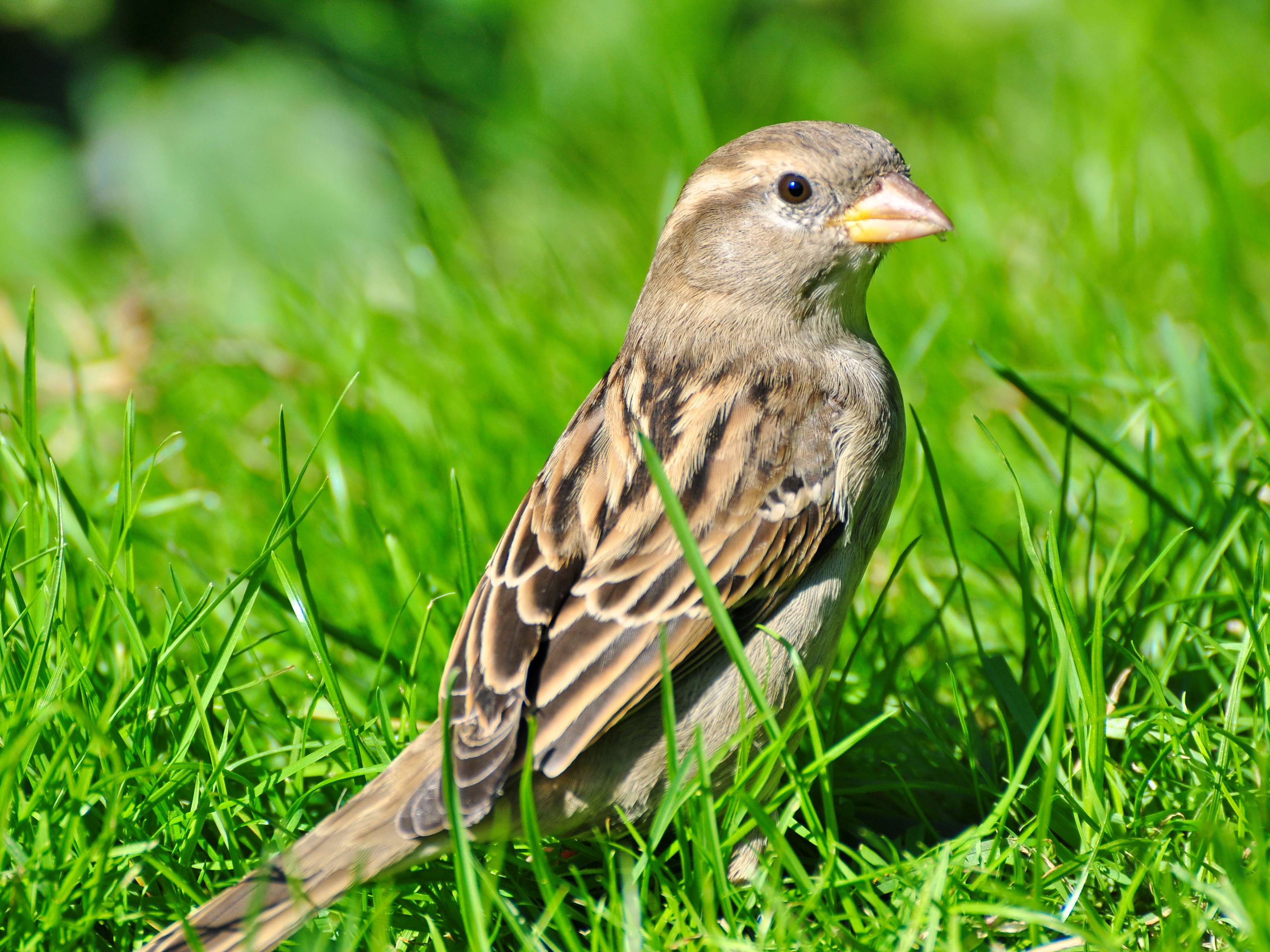 Passer domesticus, Arboretum in Zürich (Switzerland)